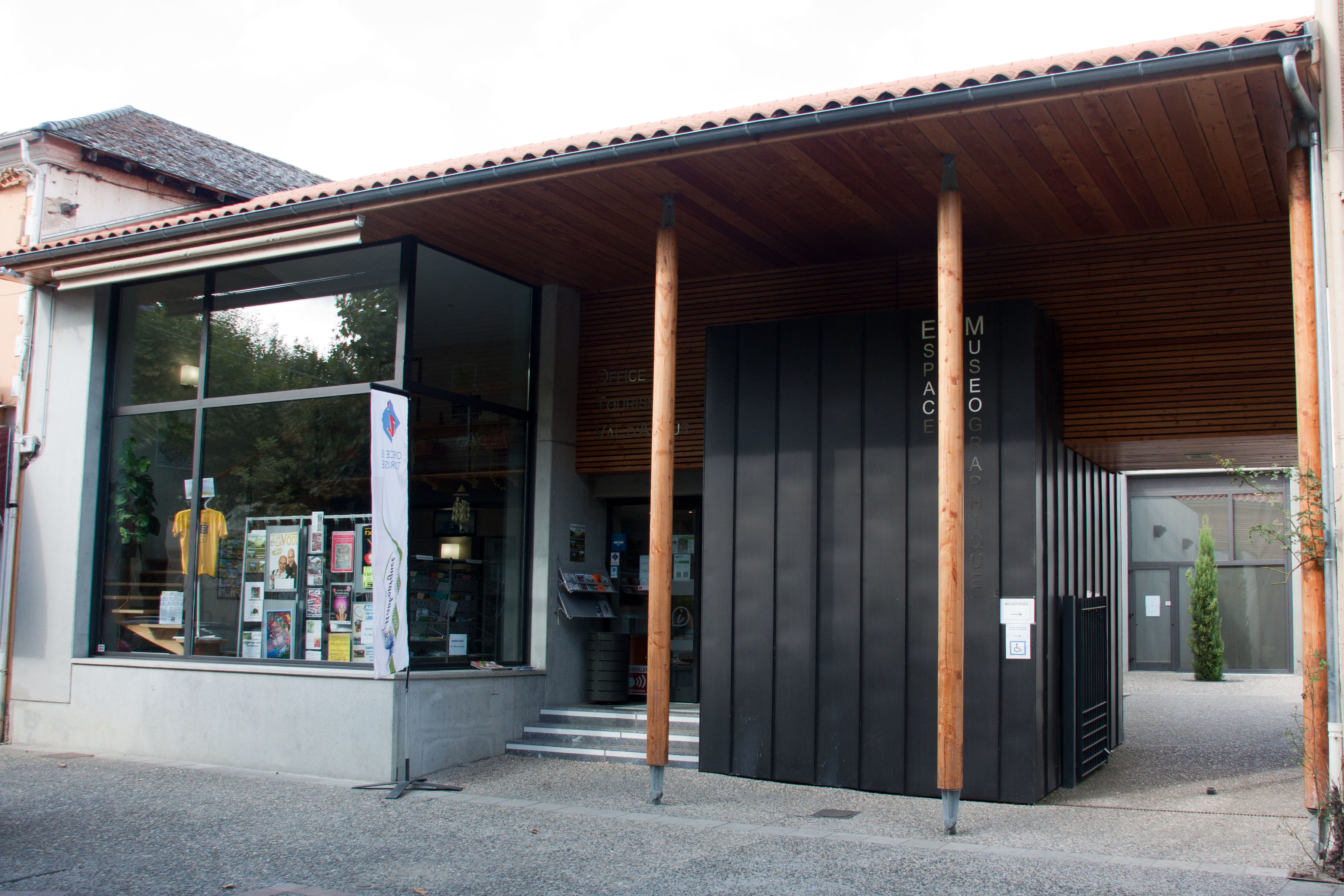 Espace muséographique de Maubourguet, Hautes-Pyrénées, France